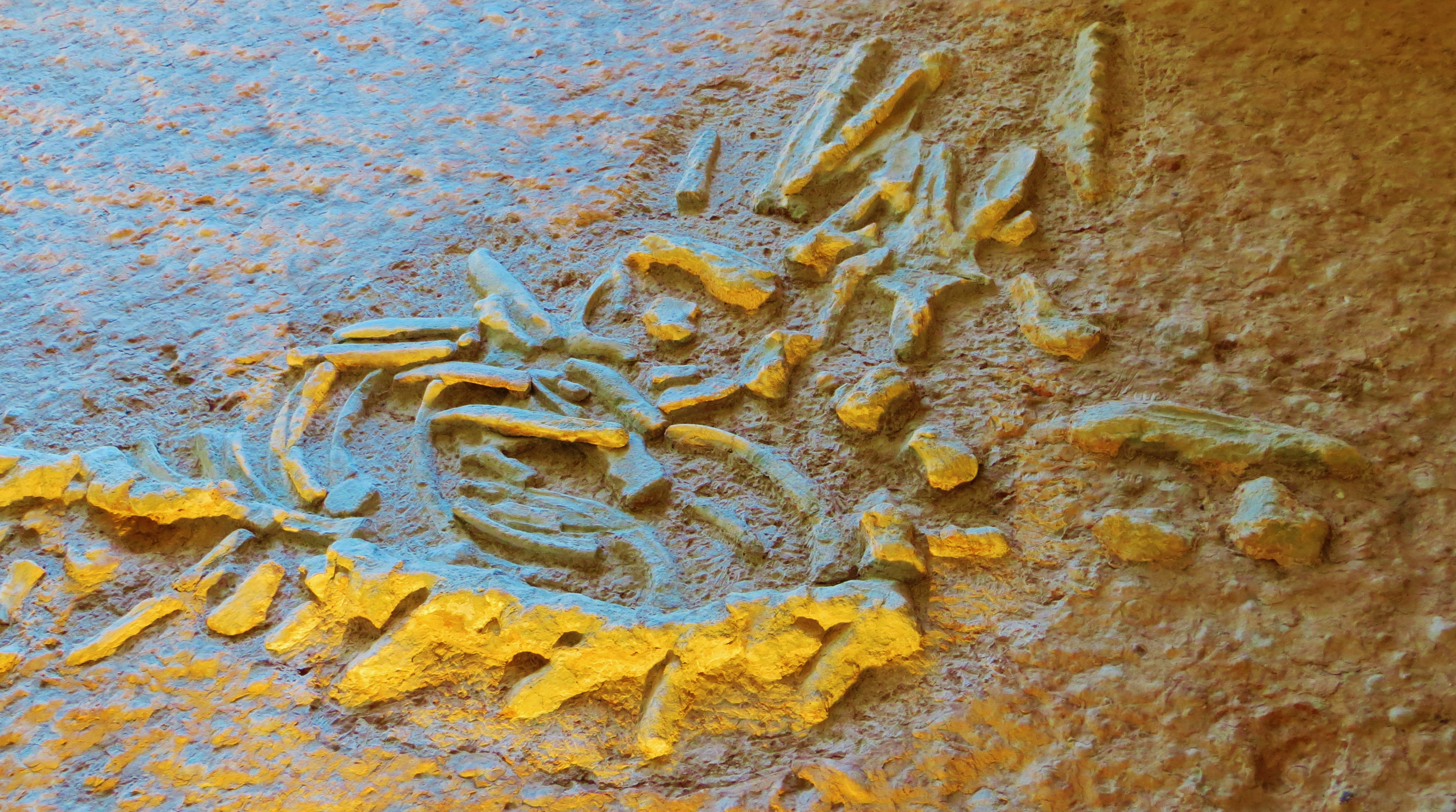 Fossil of Romeosaurus, an extinct reptile - Took the picture at Museo Paleontologico di Sant'Anna d'Alfaedo